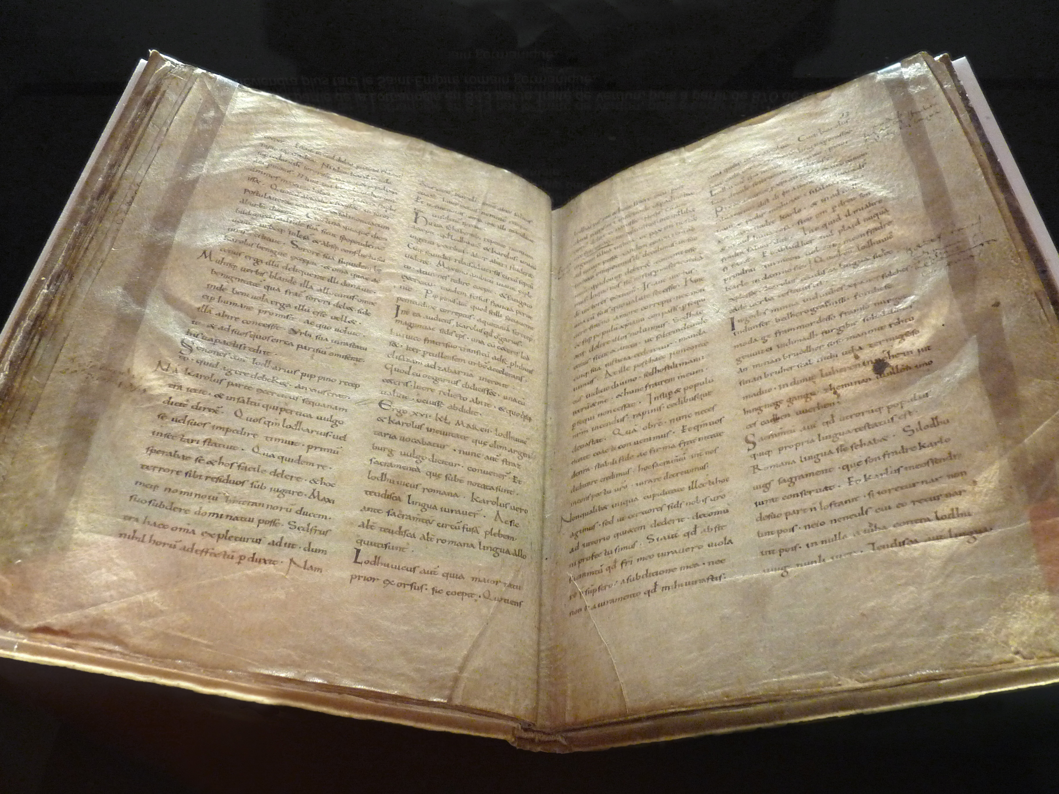 Serments de Strasbourg (842). Connus à travers la copie réalisée à Soissons au Xe siècle, présentée dans le cadre d'une exposition au Musée historique de Strasbourg en 2012.